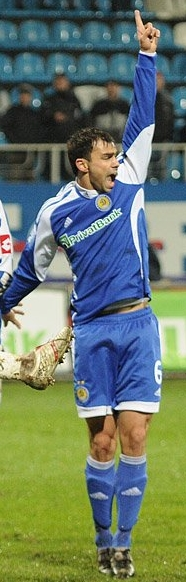 Горан Саблич — хорватский футболист, защитник.